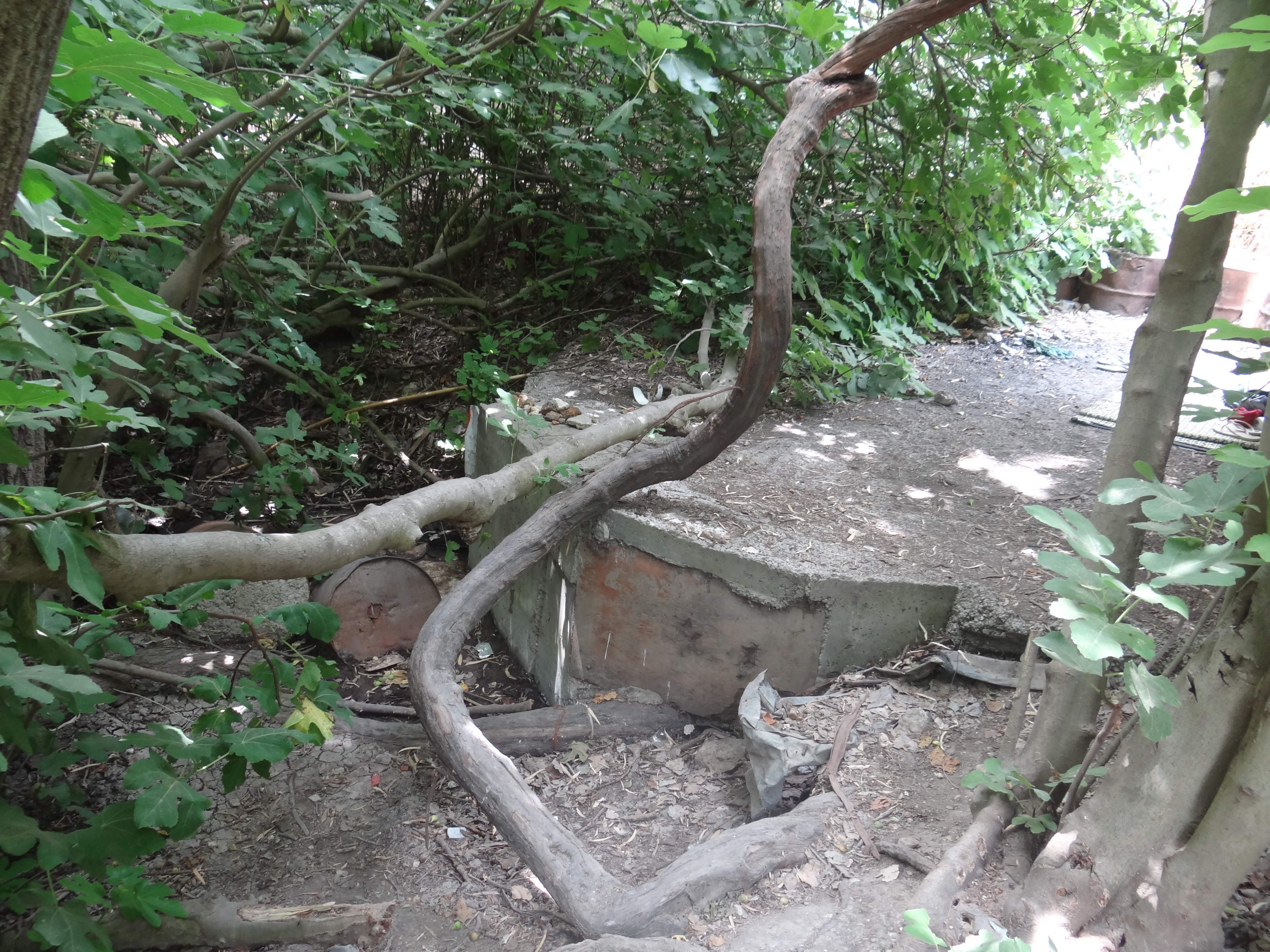 עין זריק, מעיין ליד תל זריק בעמק יזרעאל